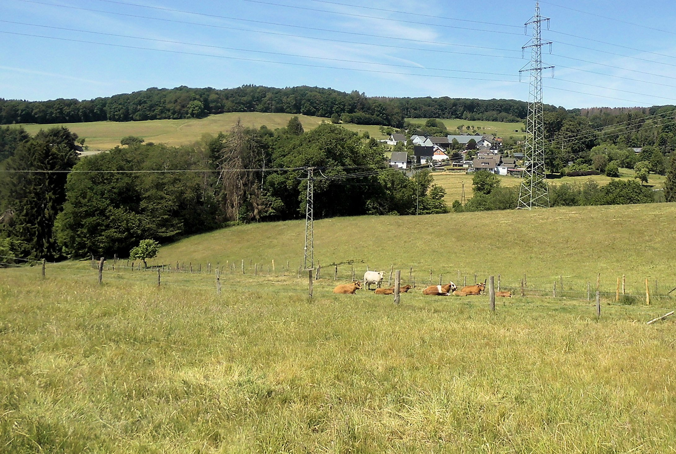 Blick aus Südosten auf Spurkenbach, Stadt Waldbröl, Nordrhein-Westfalen